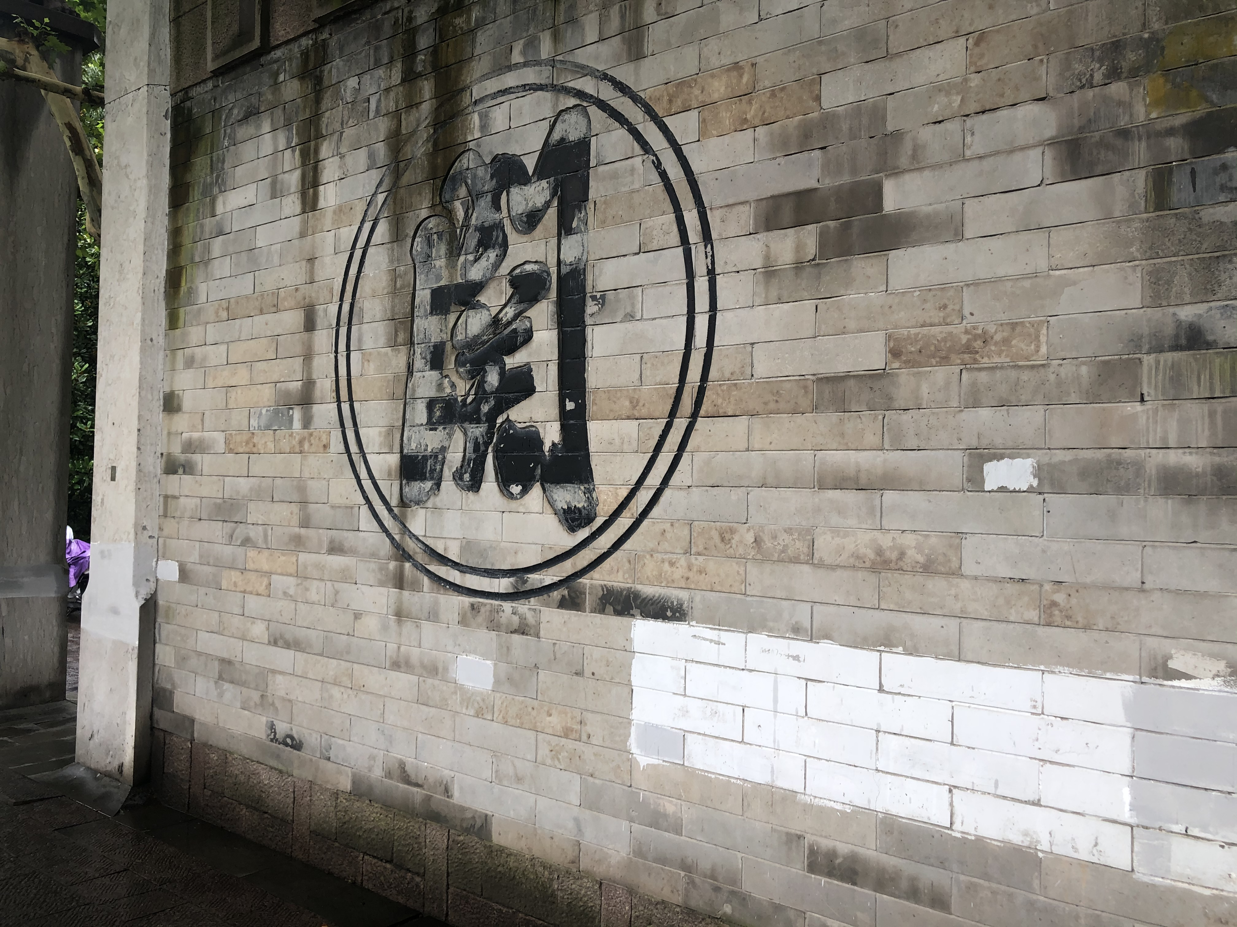 大关的关字立牌